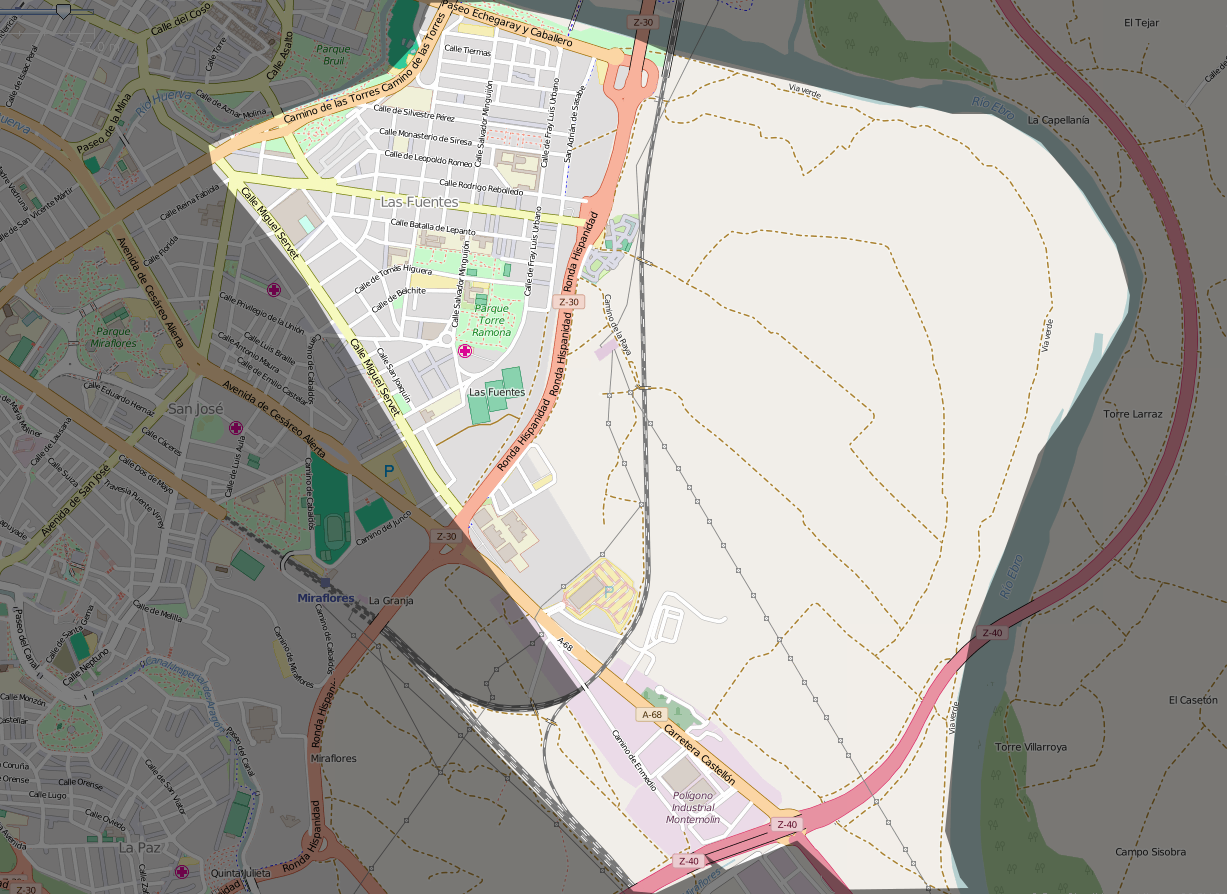 Mapa del distrito de Las Fuentes en Zaragoza.